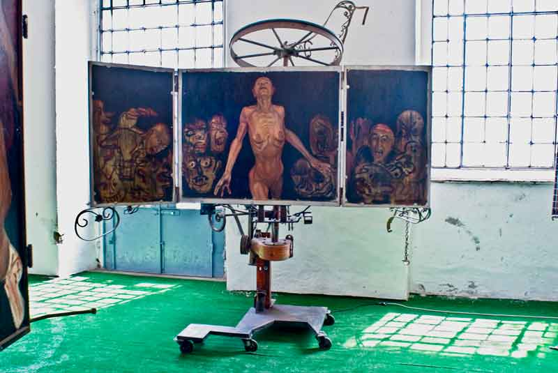 mixed media